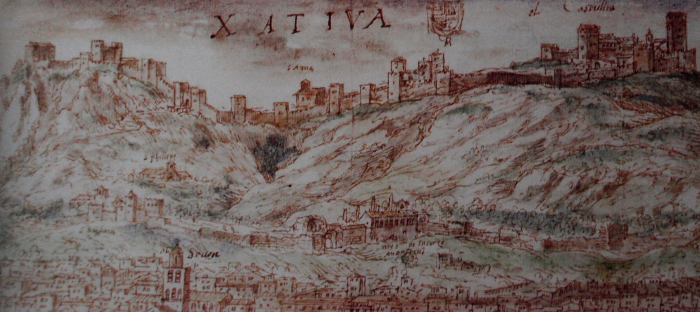 Foto del dibuix de Xàtiva d'Anton Wijngaerde de 1567